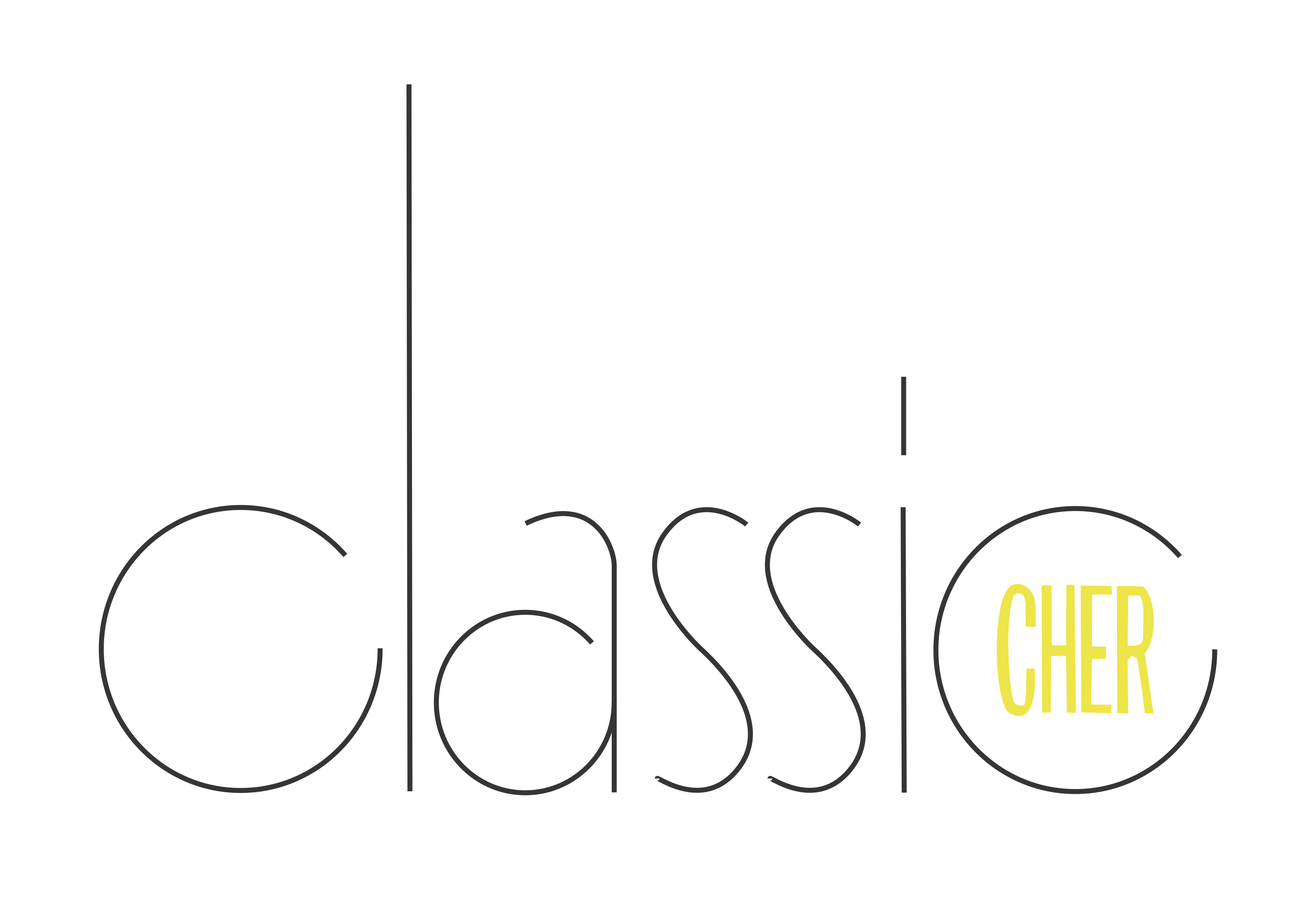 Logotipo del concierto Classic Cher de 2017.